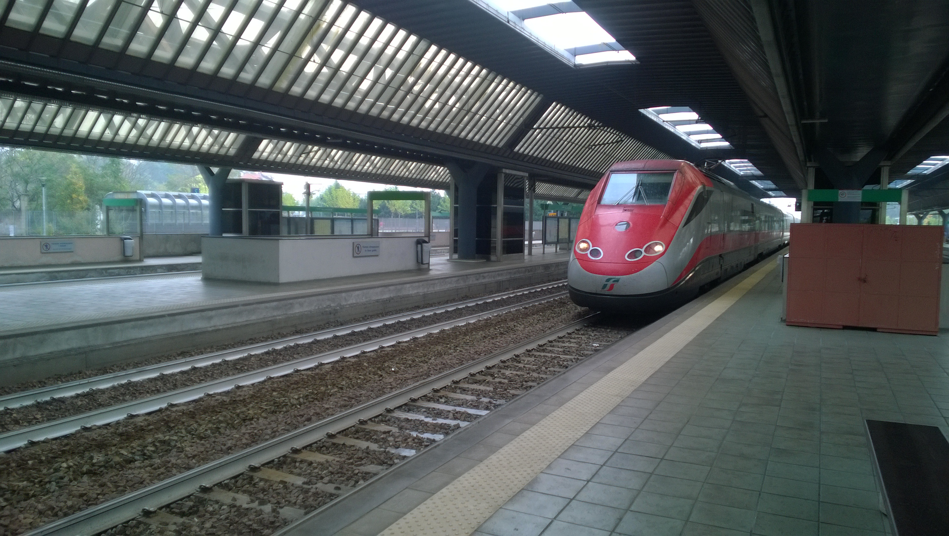 Treno ETR.500 (Frecciarossa) in transito alla stazione di Milano Villapizzone (MI), Italia.